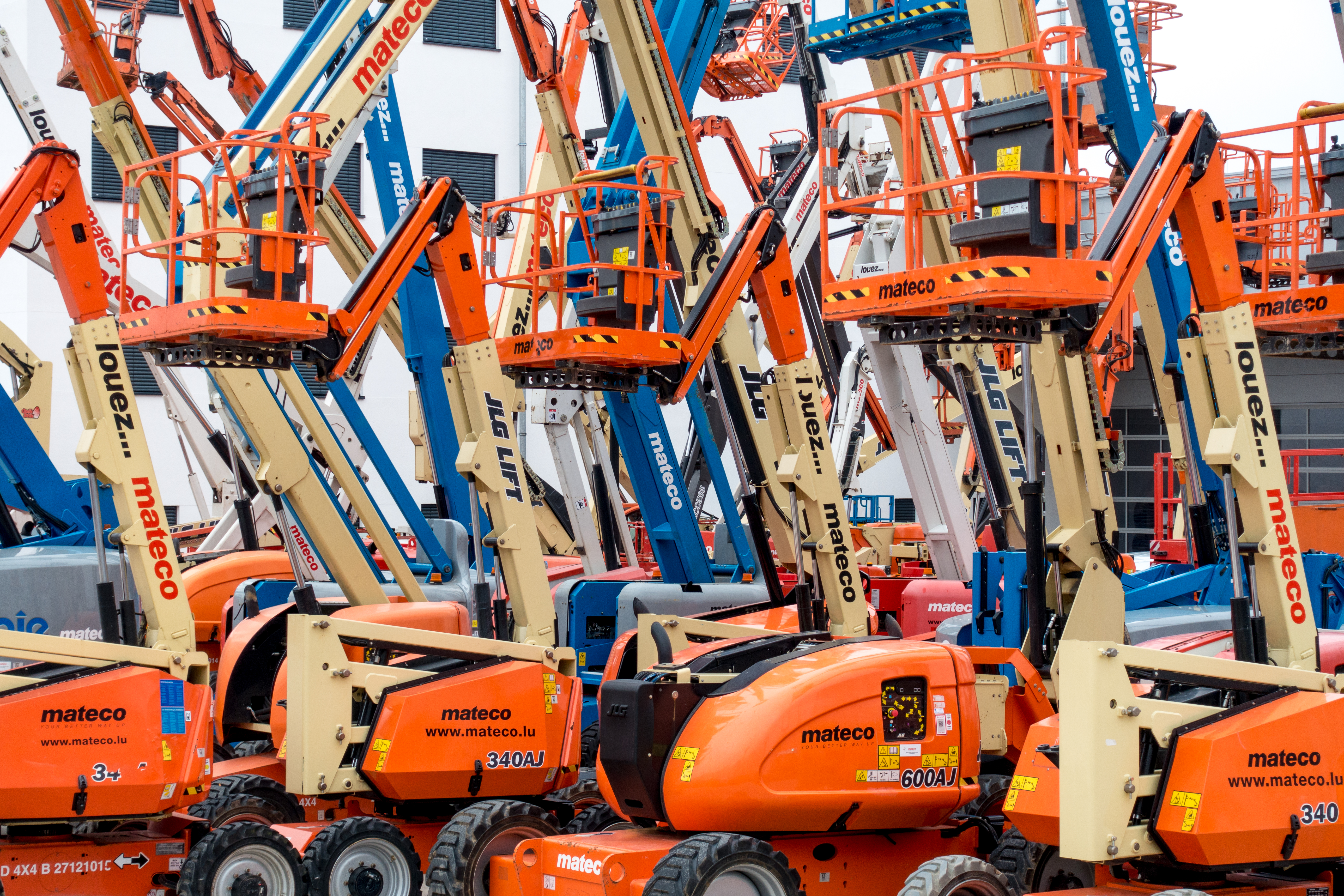 Teleskoplueder vun der Firma Mateco an der Zone industrielle «Chaux de Contern».